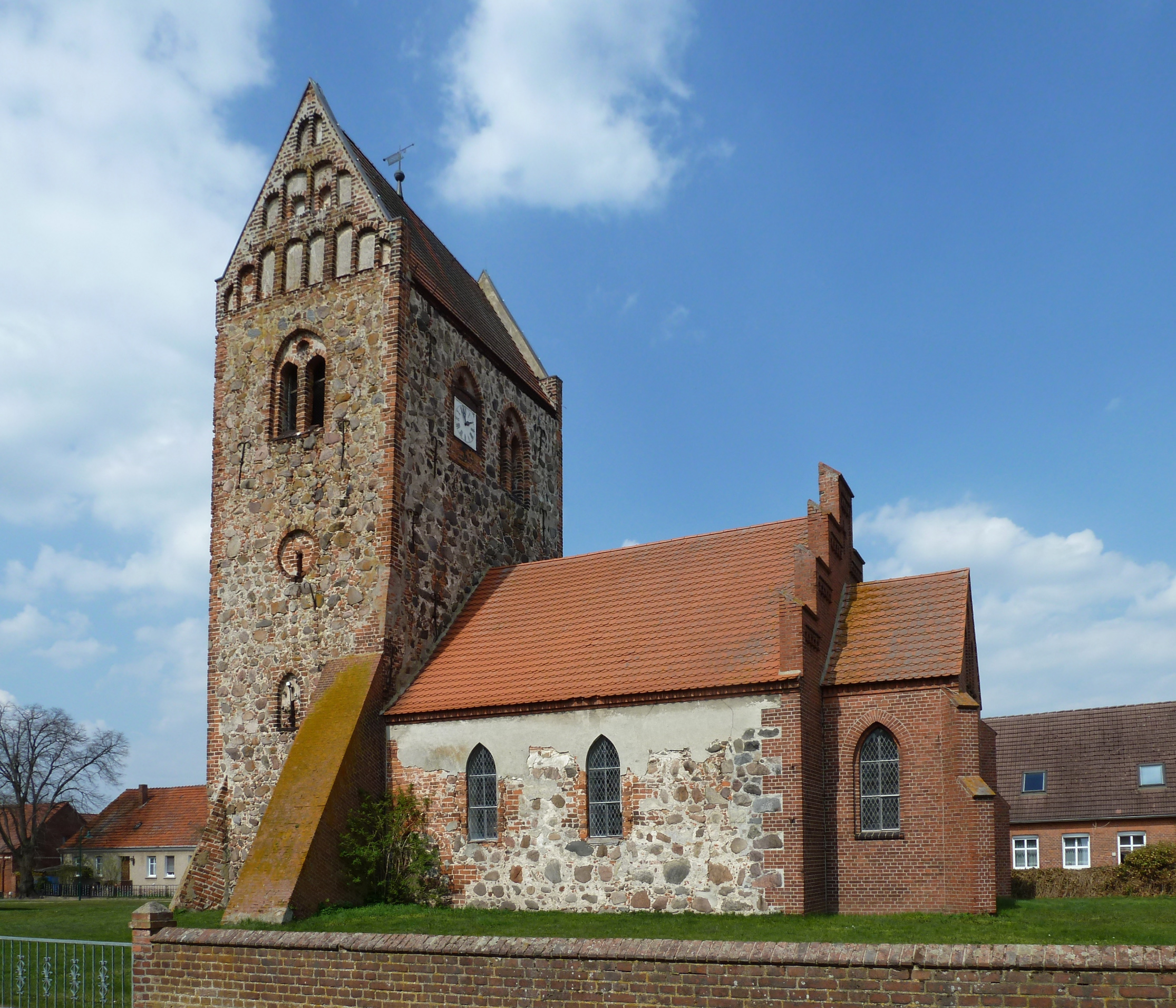 Dorfkirche in Netzow, Baudenkmal